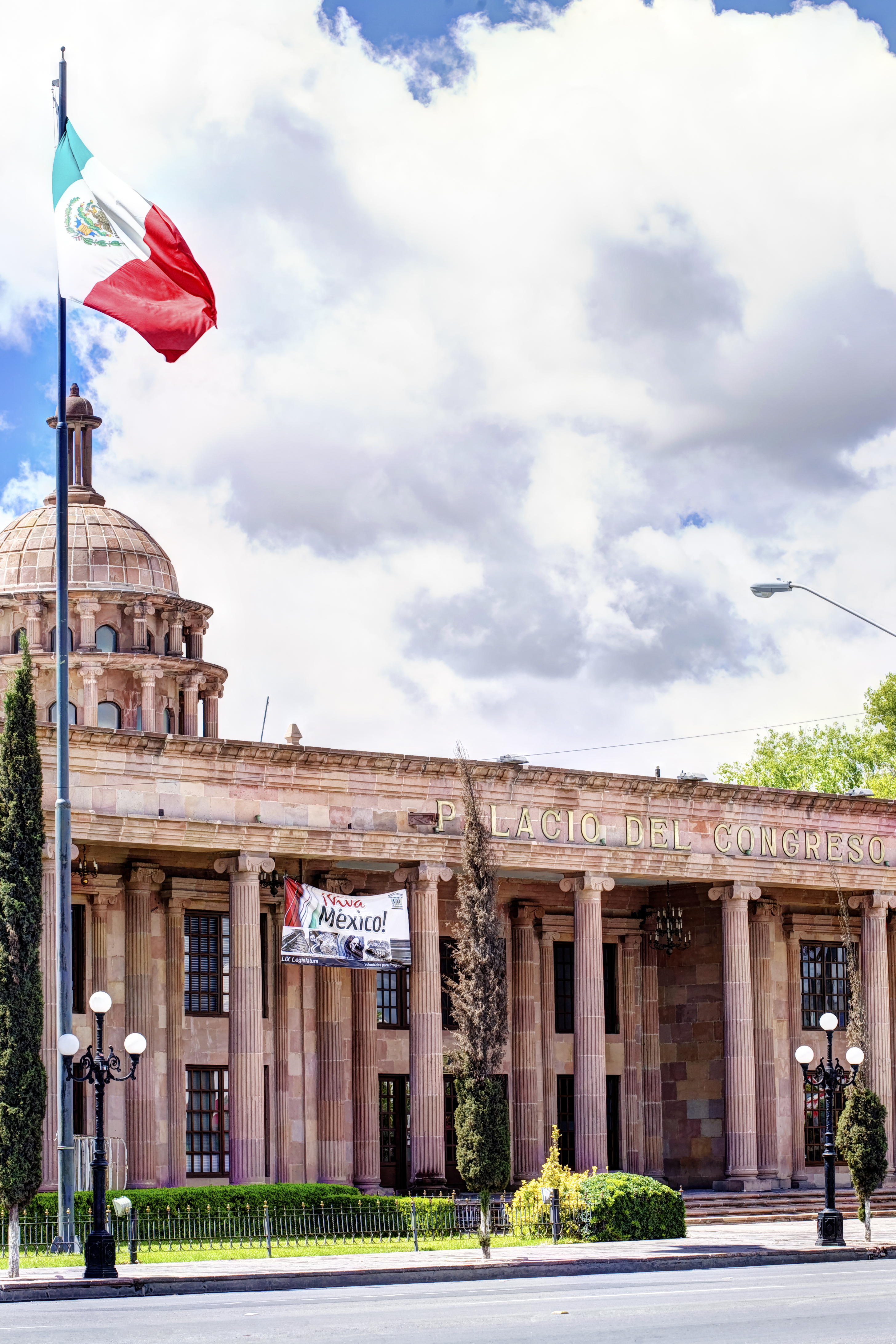 Fachada del Palacio del Congreso de la ciudad de Saltillo Coahuila.